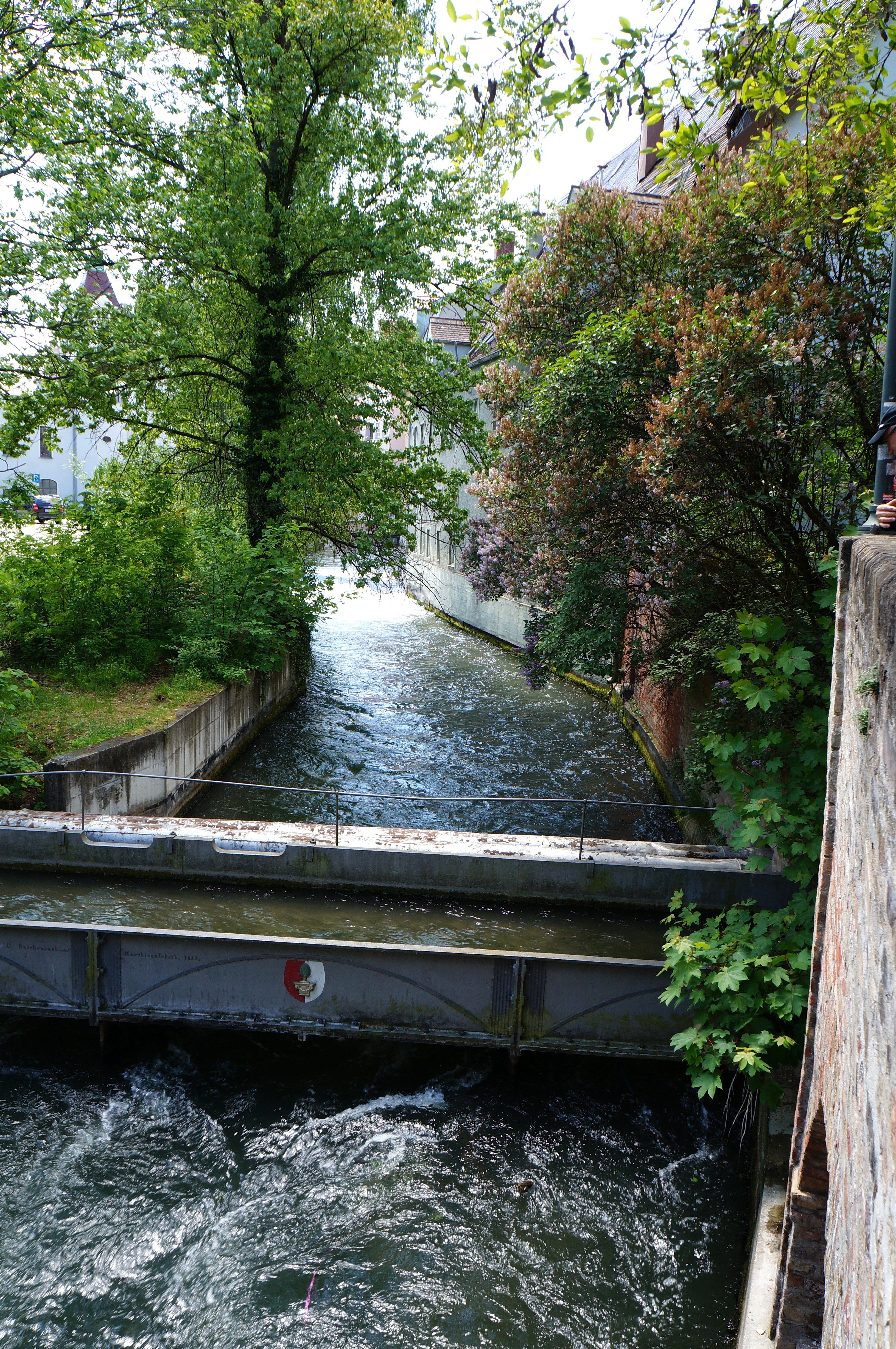 Kanalbrücke beim Kino "Liliom" in Augsburg.